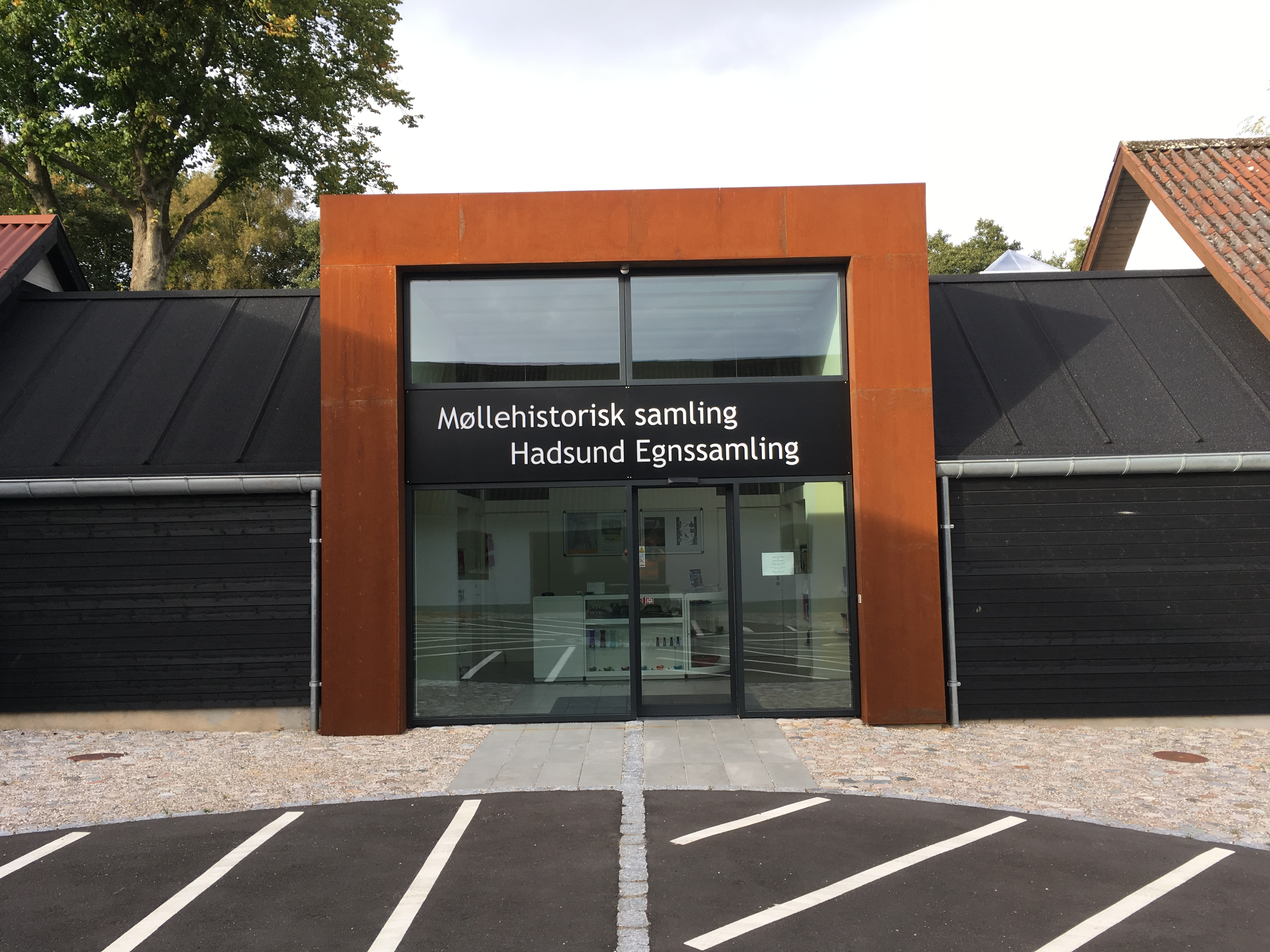 Indgangspartiet til Møllehistorisk Samling og Hadsund Egnssamling i Hadsund.